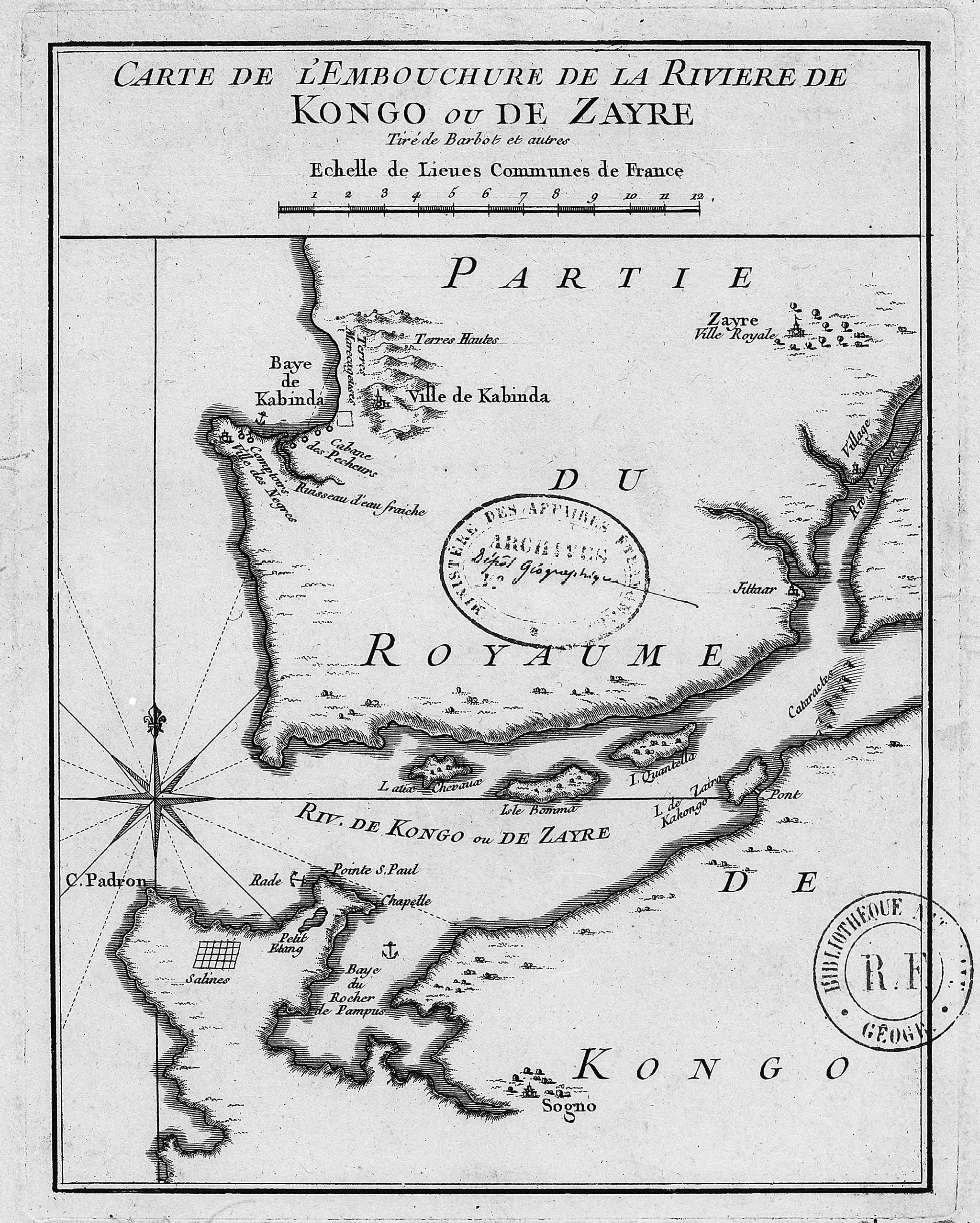 Carte de l'embouchure de la rivière de Kongo ou de Zayre / tiré de Barbot et autres [par Bellin]